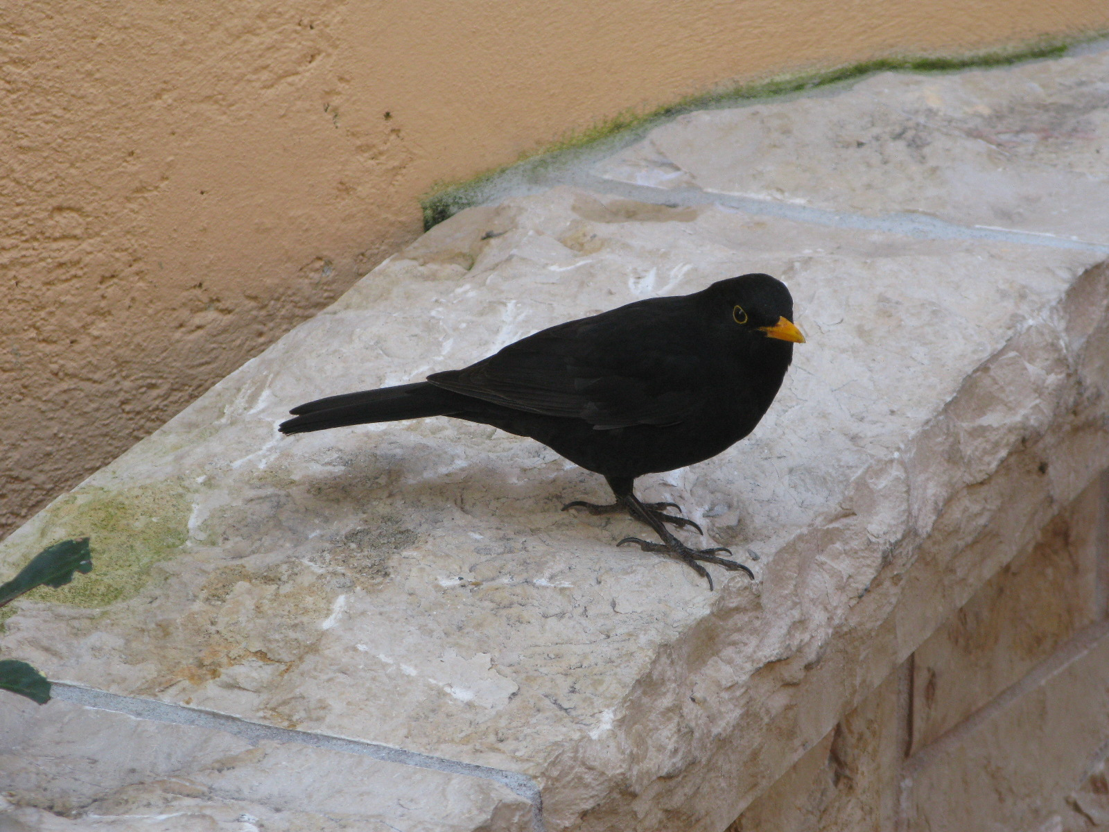 Merle noir mâle (turdus merula), à Monaco-Ville, Monaco.